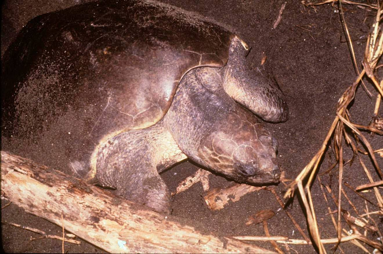 Avistamiento de tortugas en la playa en la Isla Cañas, Los Santos